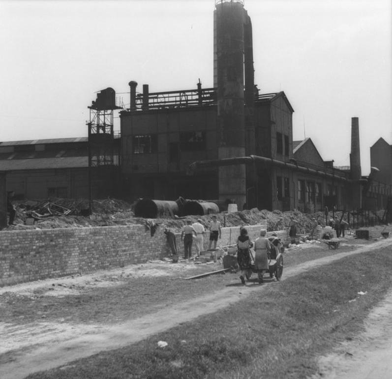 Berlin, Aufbau Bergmann-Borsig Zentralbild/Igel 13.7.1949 Wiederaufbau in der DDR [Sowjetischen Besatzungszone] im Juli 1949 UBz: Blick auf das Bergmann-Borsig-Werk in Berlin-Wilhelmsruh von der Strassenseite her.